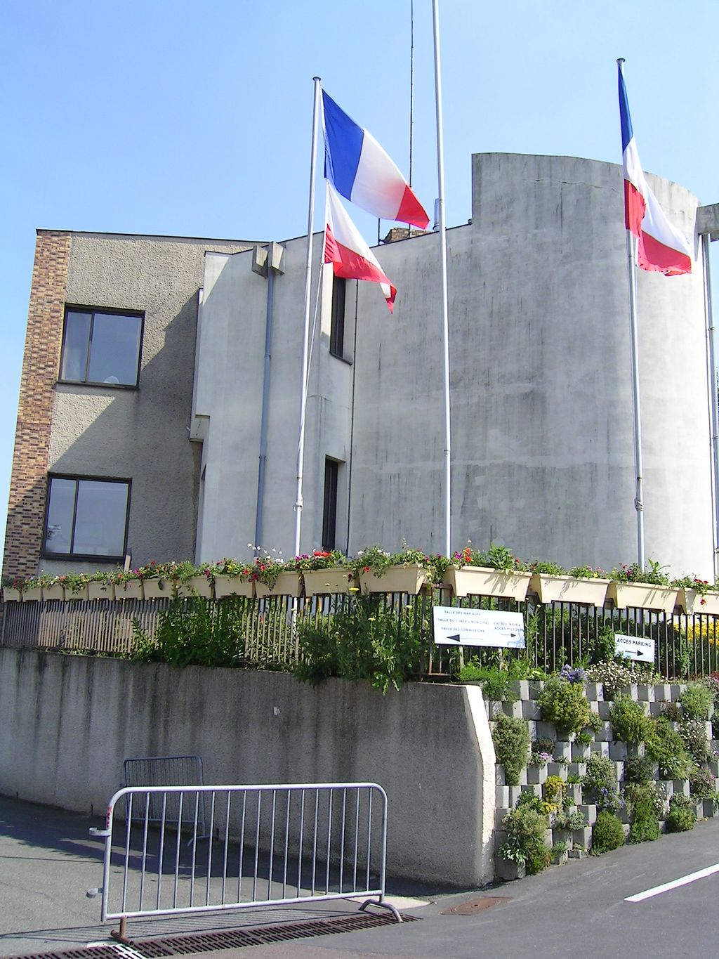 Hôtel de Ville, 13 bis rue d'Avron, 93250 Villemomble.